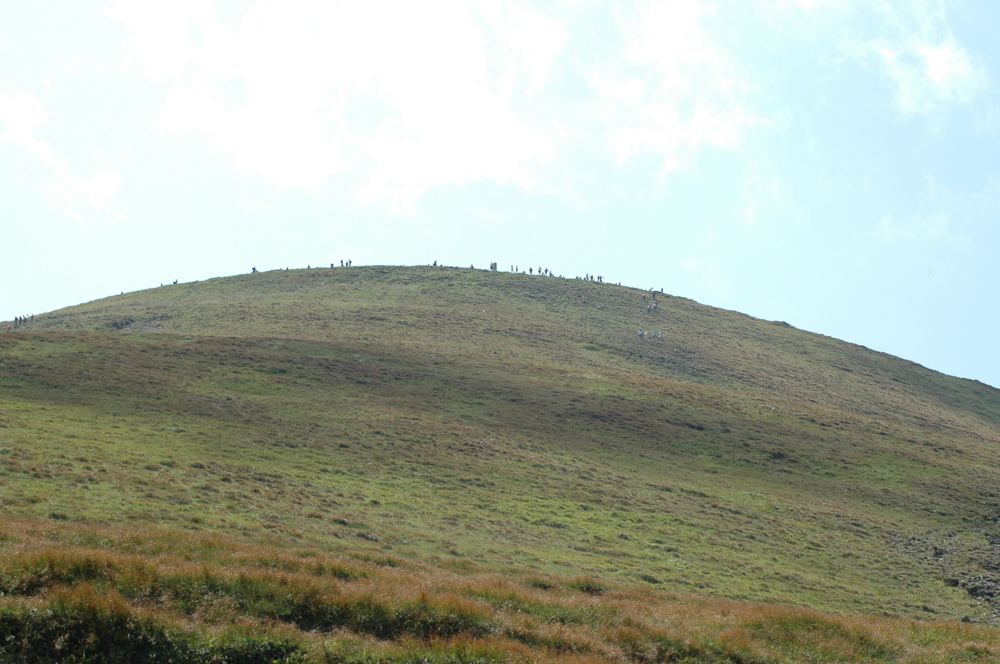 Hoverla